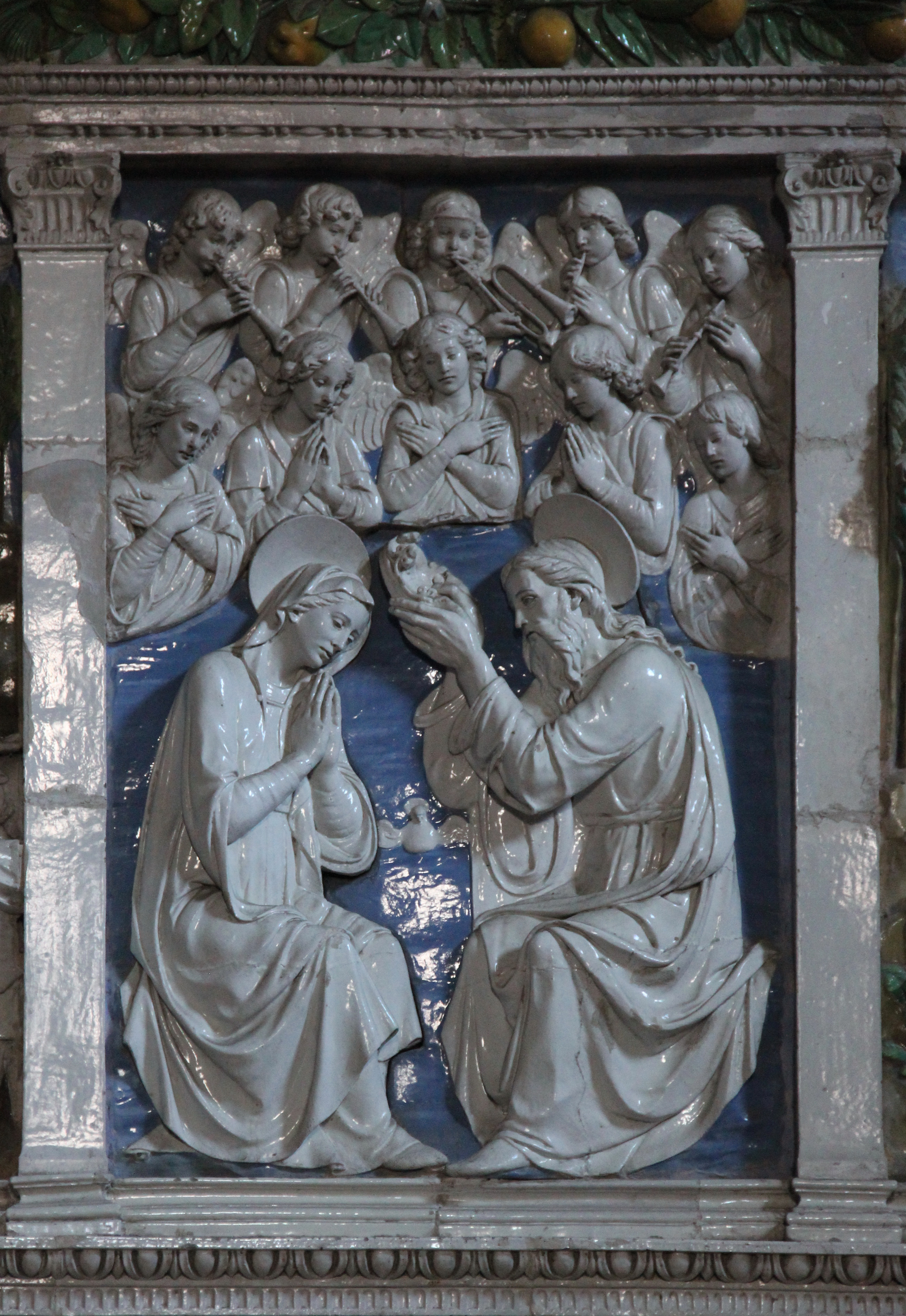 Pieve delle Sante Flora e Lucilla, Santa Fiora, Italy - Andrea della Robbia's work